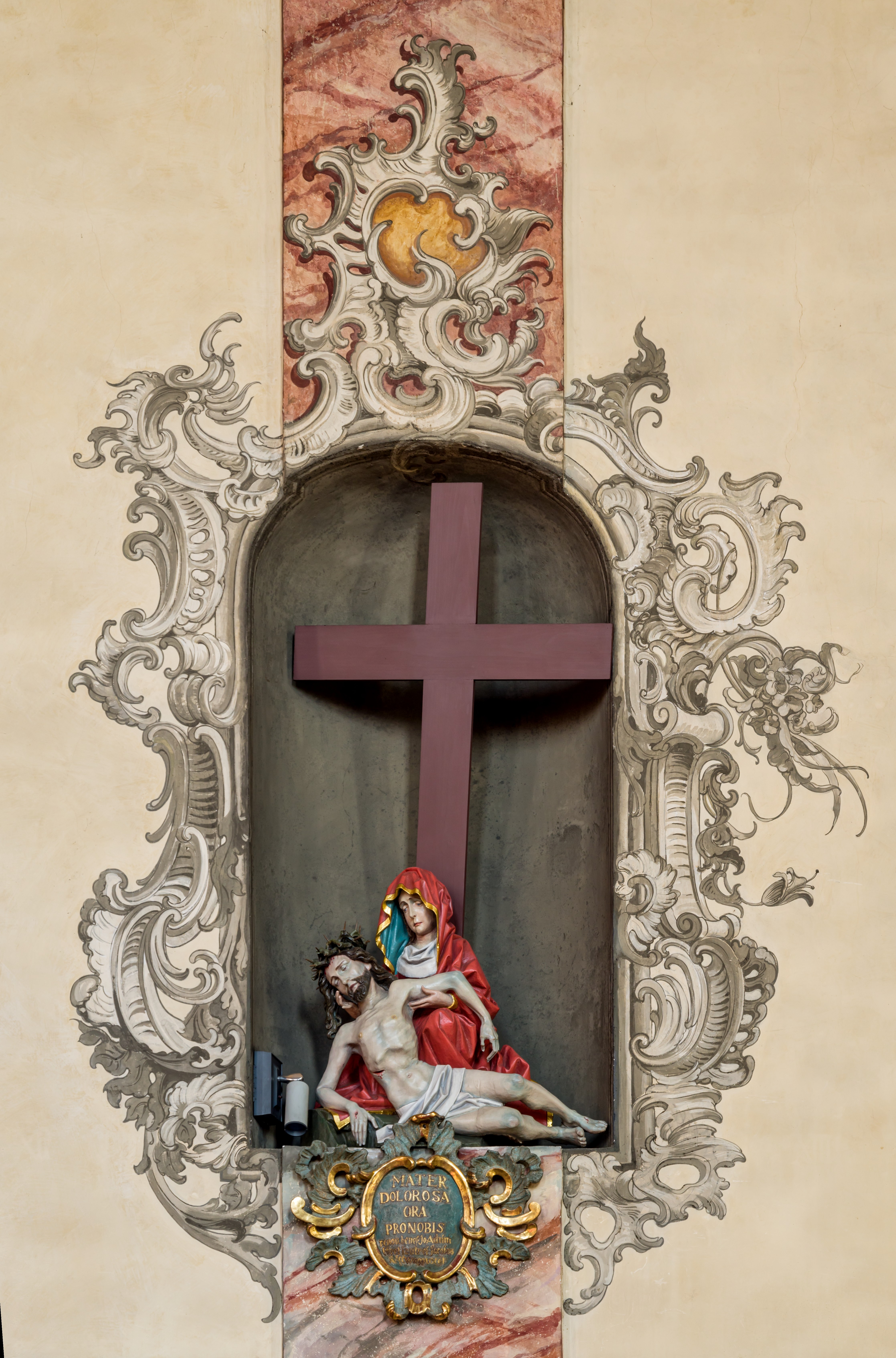 St. Brigitta Niederschopfheim, Hohberg